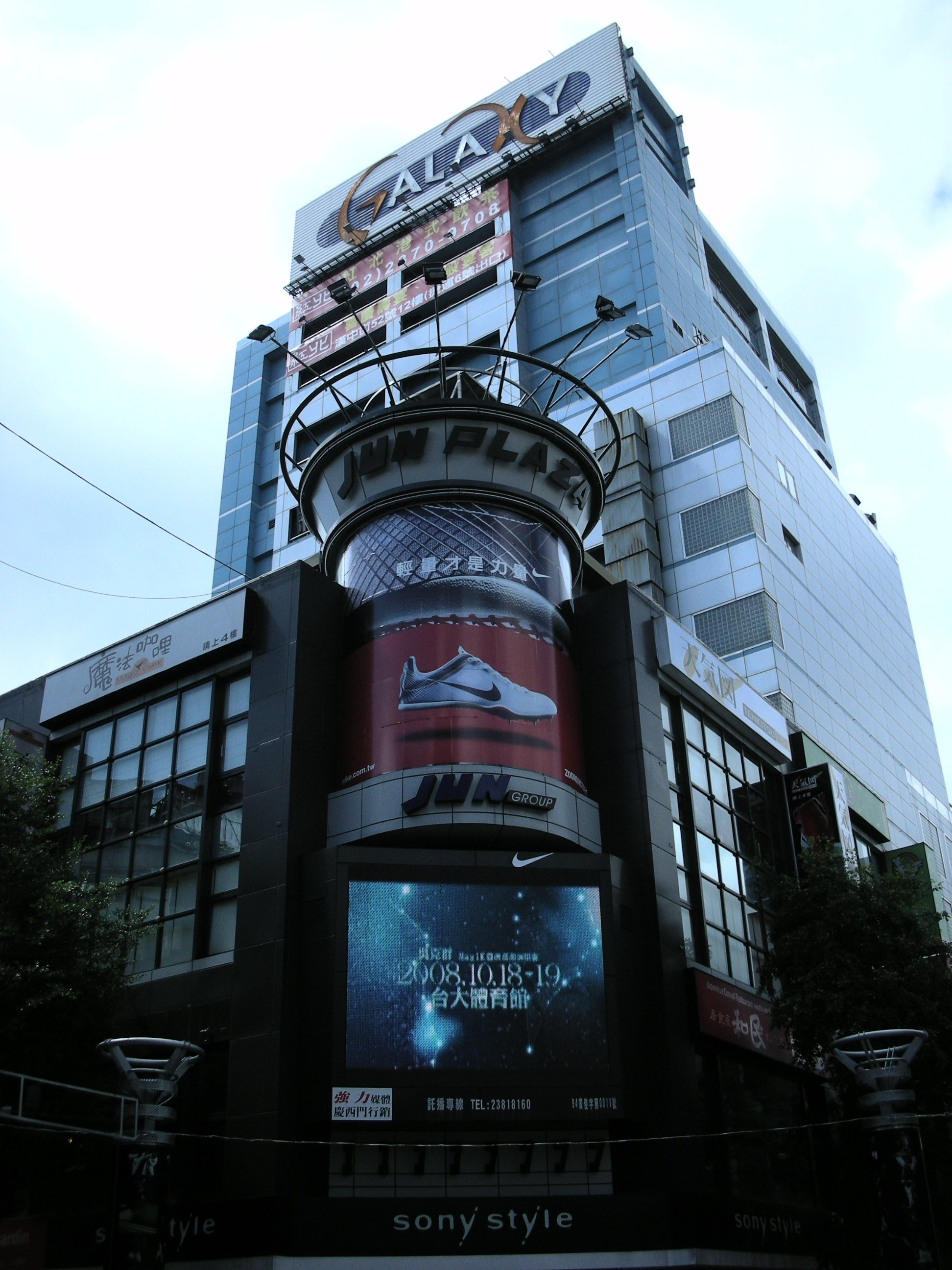 西門町sony style與萬國百貨